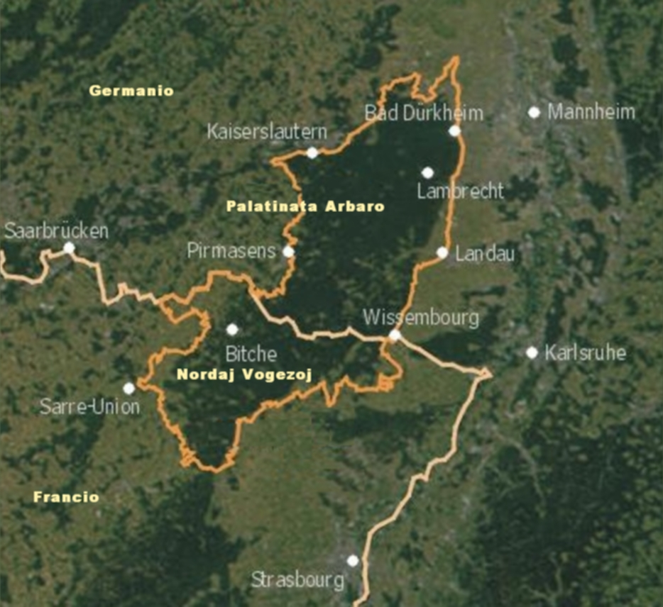 Skiza mapo de la biosfera rezervejo Palatinata Arbaro - Nordaj Vogezoj Fonto: bildo el la germana vikipedio (grafike ne aparte bonkvalita), mem ankoraŭ rapidete prilaborita